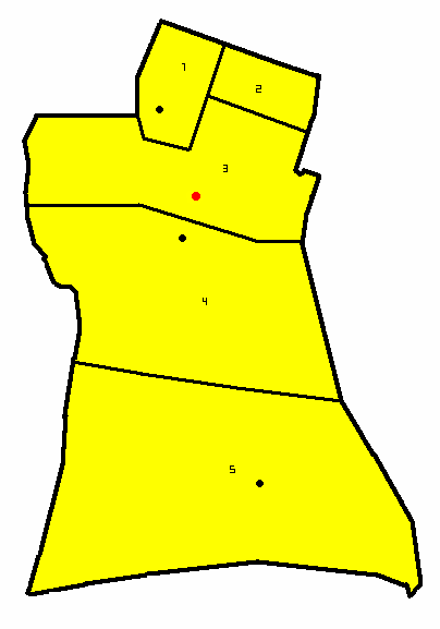 Mapa con divición en distritos del departamento Pocito, provincia de San Juan, Argentina